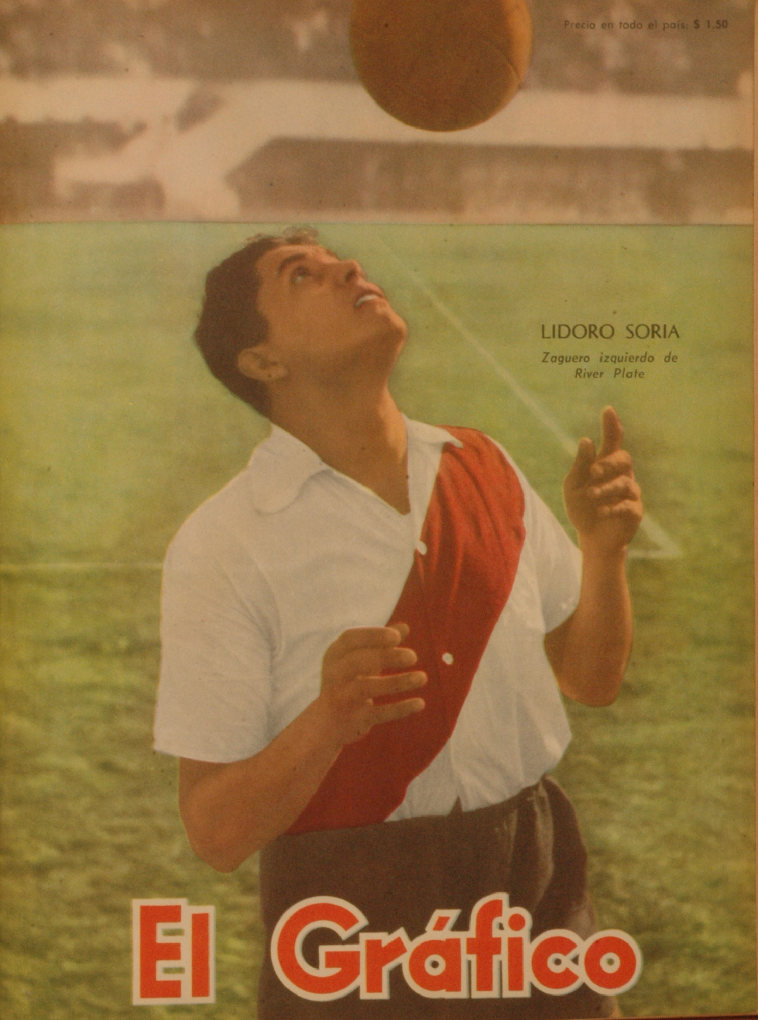 El Grafico del 15 de Agosto de 1952. Edicion 1723